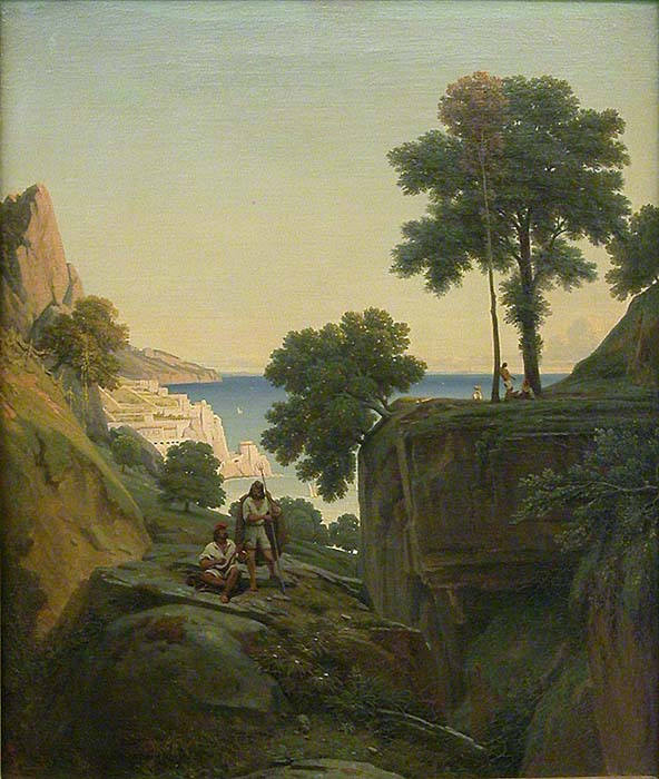 Claude-Félix-Théodore-Caruelle d'Aligny : Vue prise à Amalfi, dans le golfe de Salerne